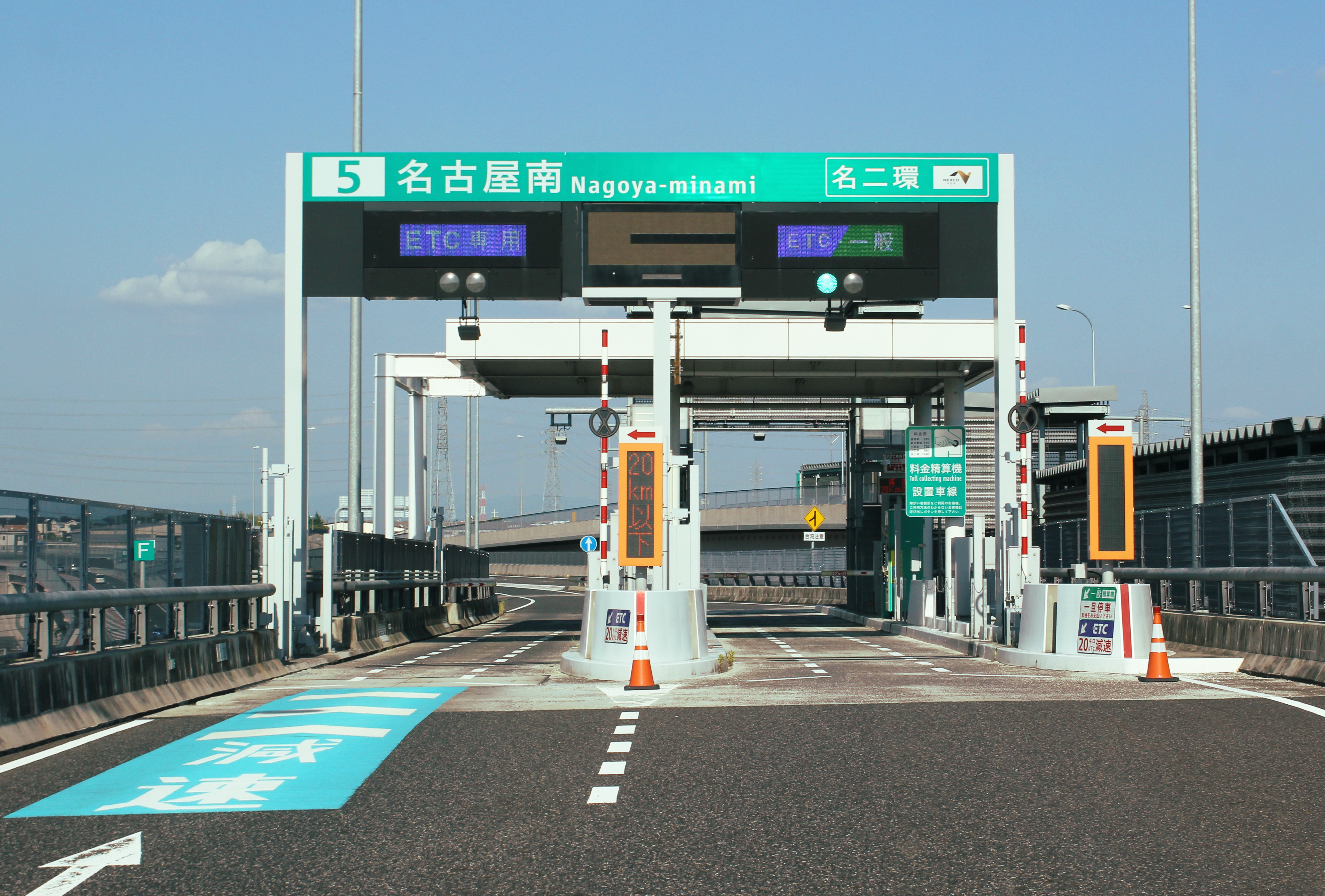 名古屋南JCT 名古屋高速→名二環の料金所